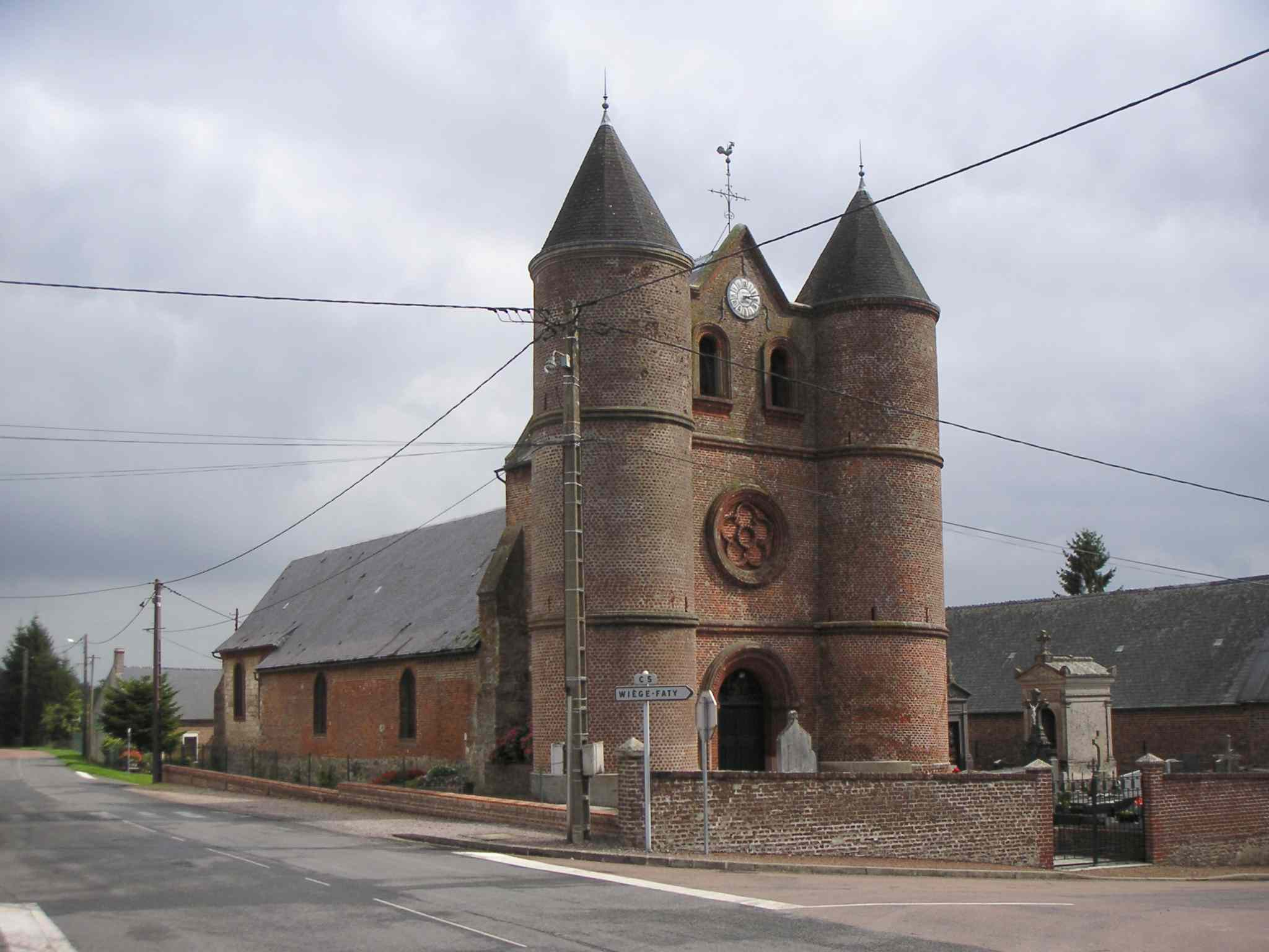 Photo de l'église fortifiée de Monceau sur Oise (Aisne) prise par moi le 01 septembre 2005